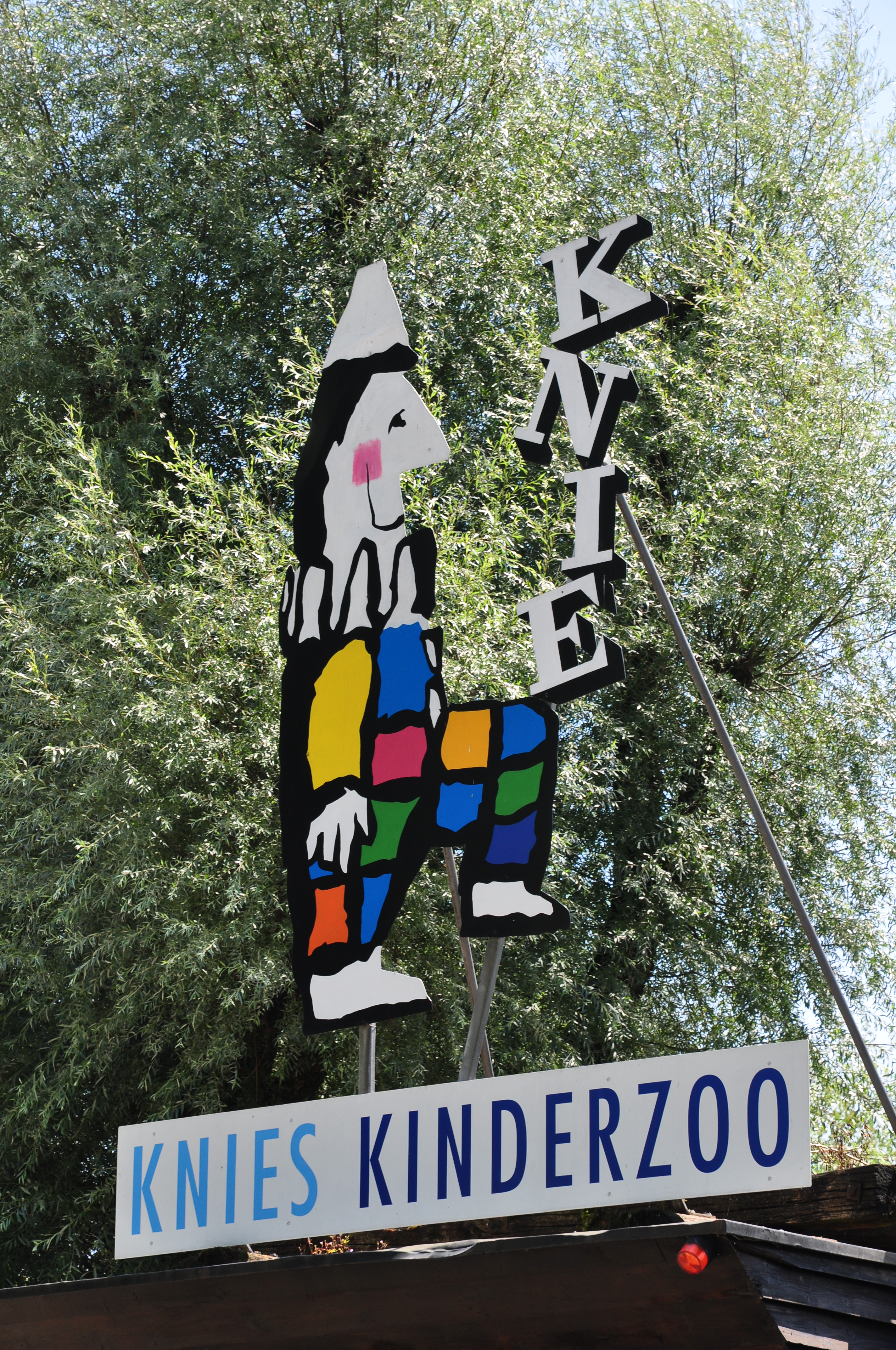 Knie's Kinderzoo in Rapperswil (Switzerland)